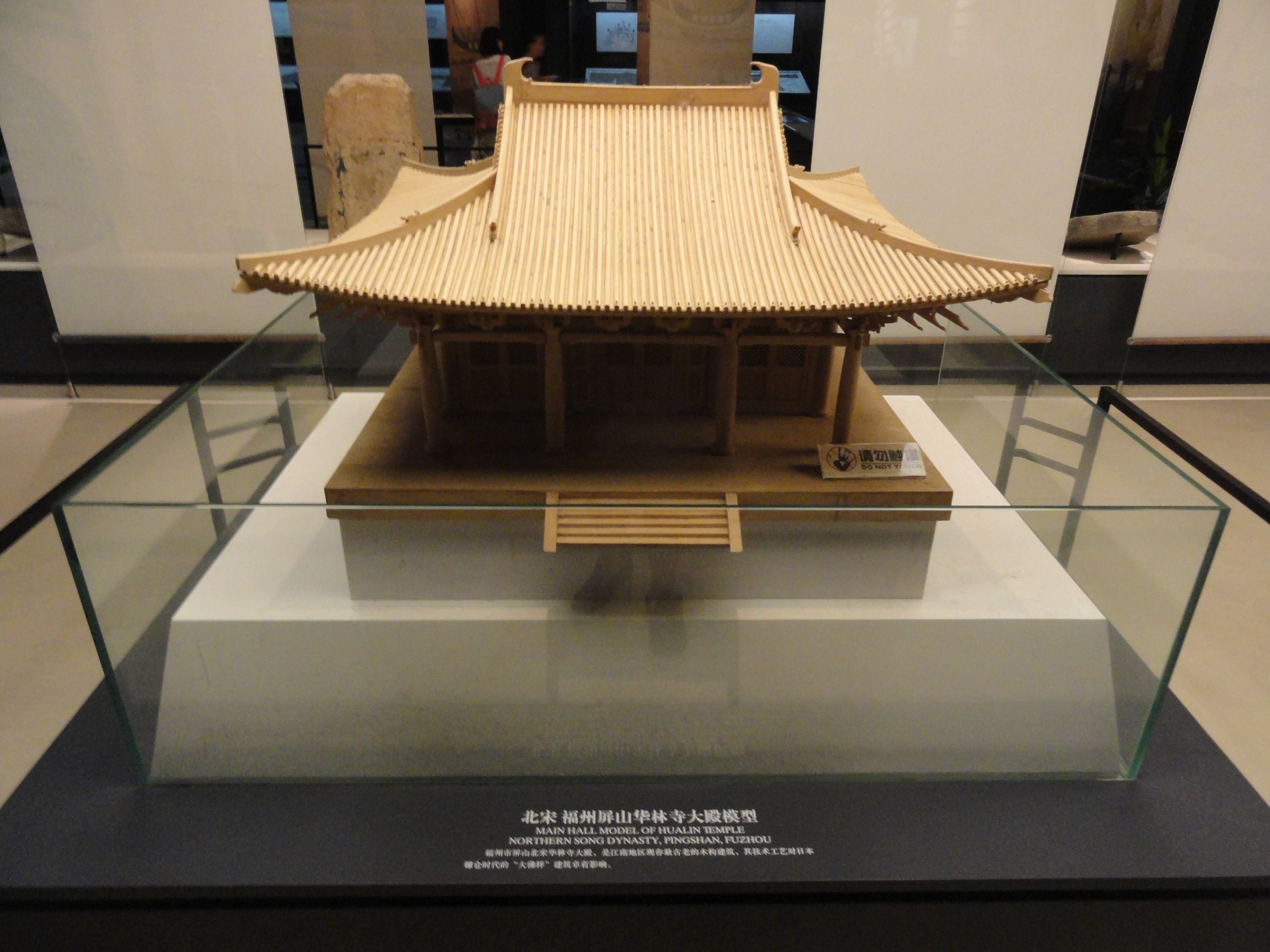 中文（中国大陆）: 福建博物院收藏的福州华林寺模型